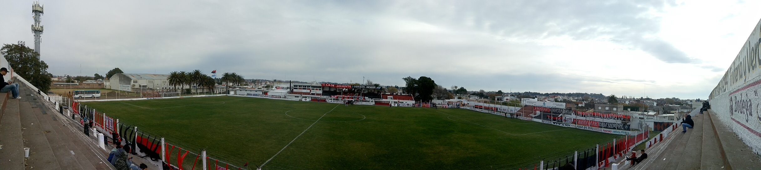 Vista panorámica del estadio Enrique Mendizabal desde "La visera".